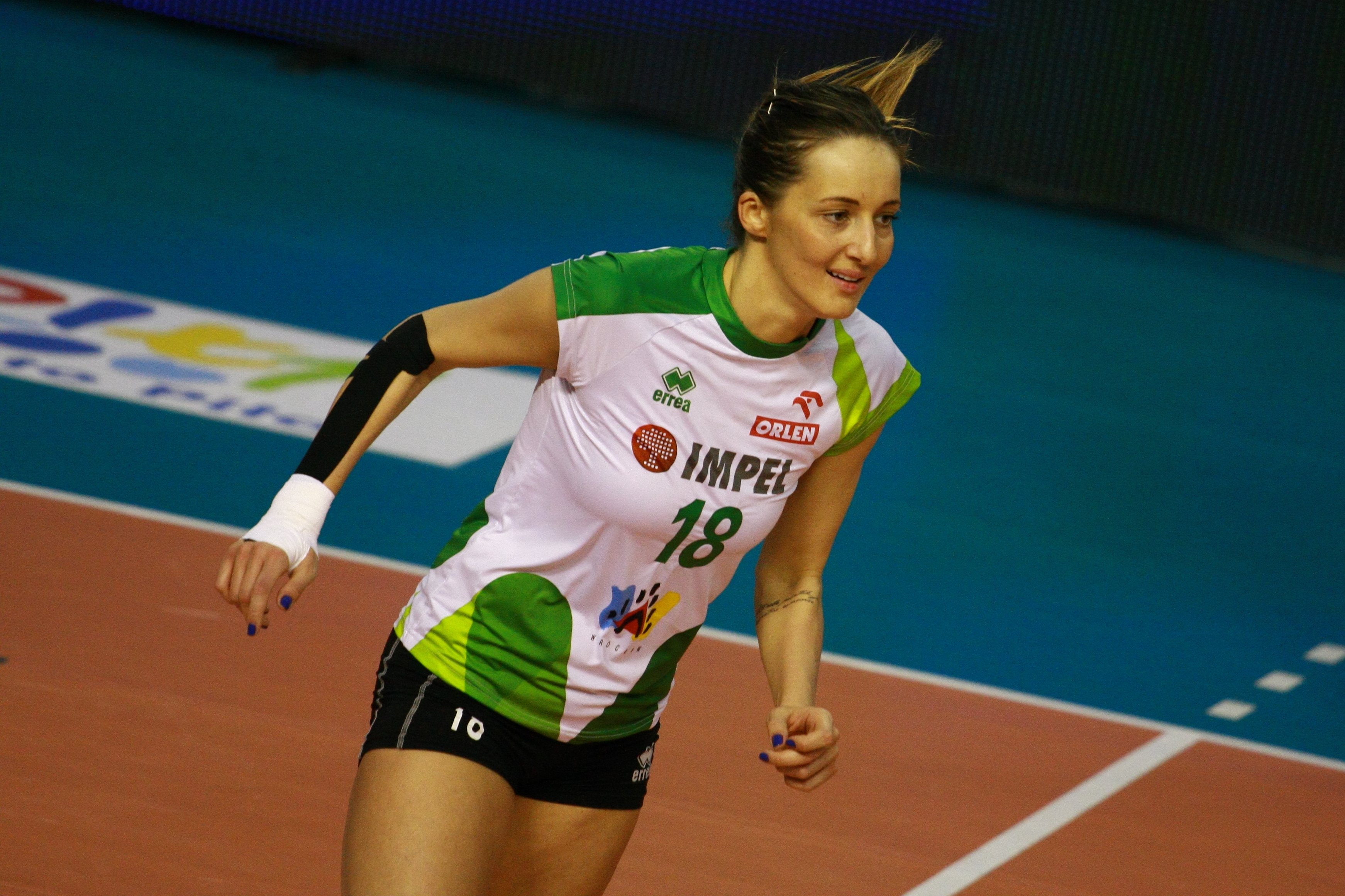 Atom Trefl Sopot Bank BPS Muszynianka Fakro Muszyna Tauron MKS Dąbrowa Górnicza Impel Gwardia Wrocław